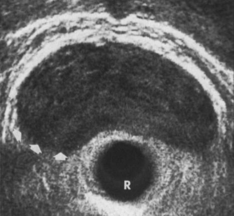 Շագանակագեղձի T2b քաղցկեղ